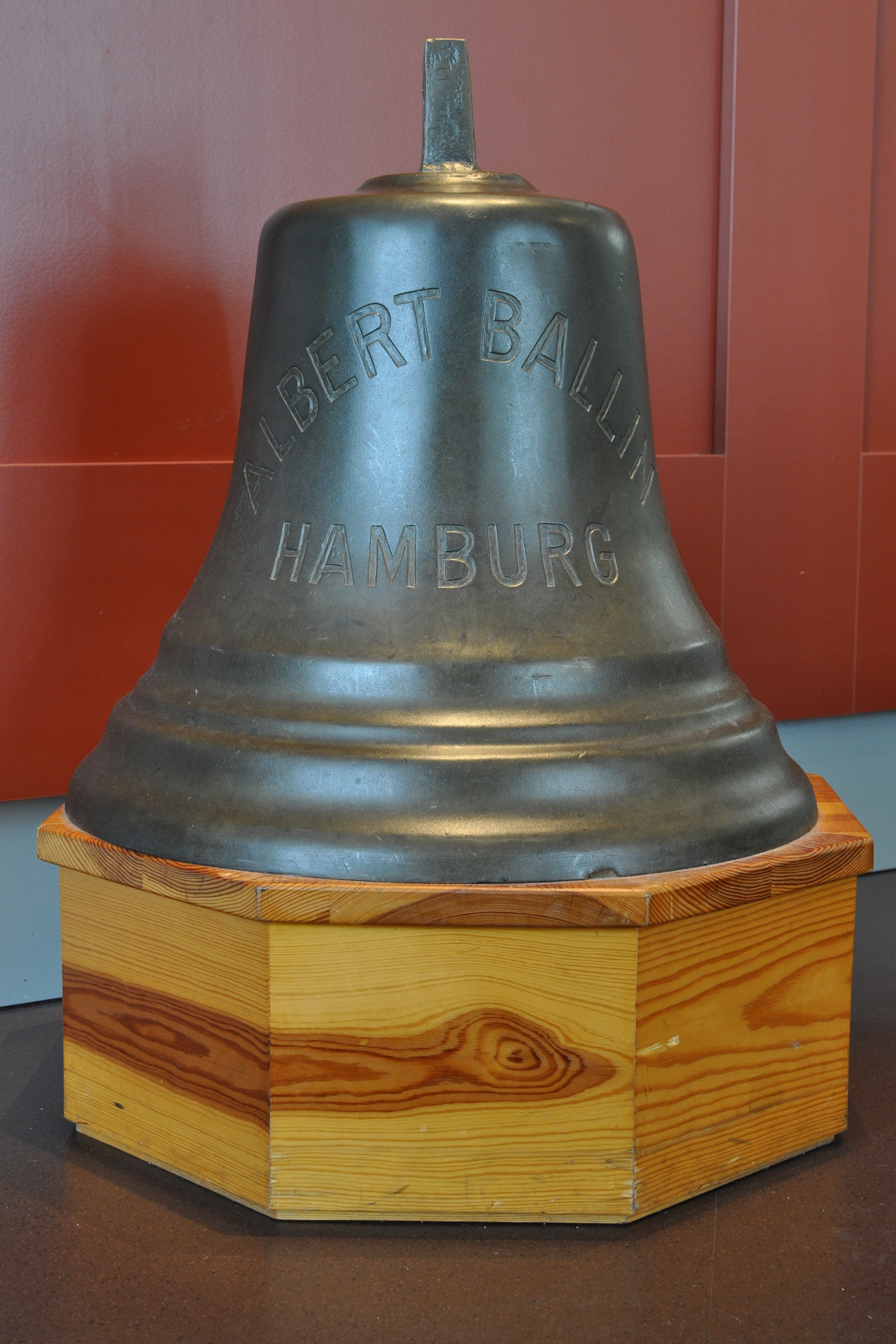 Schiffsglocke der Albert Ballin in der Ausstellung des Museums für Hamburgische Geschichte.